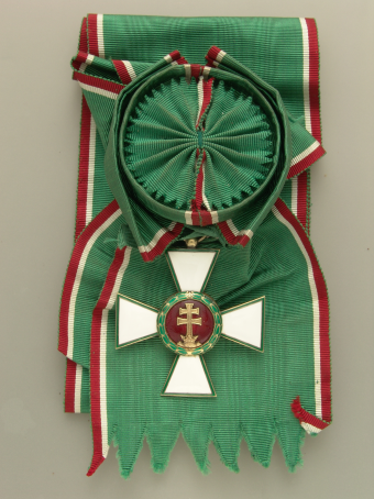 Magyar Érdemrend nagykeresztje, 1936-1939 közötti változat